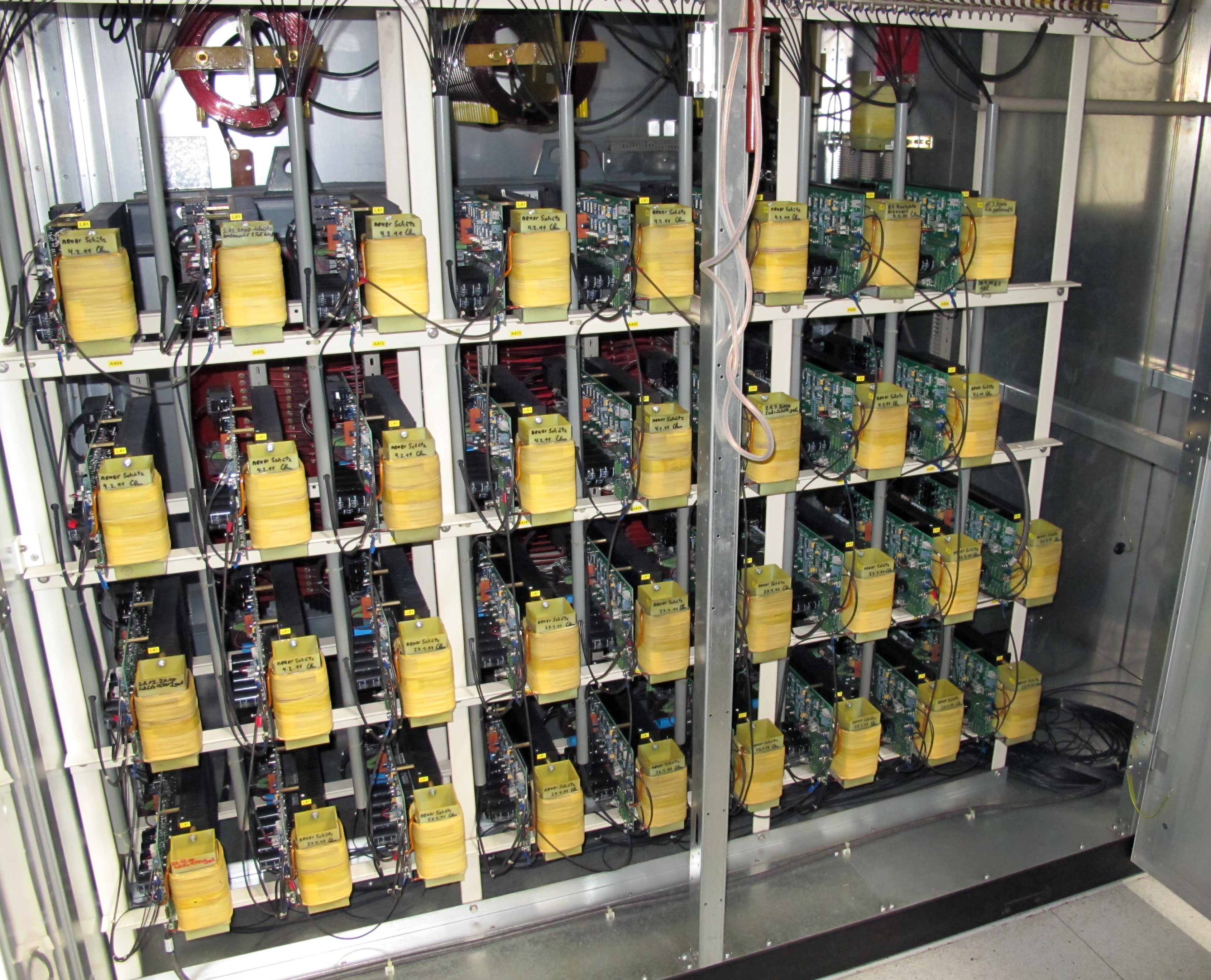 Moosbrunn, TSW2100D-Kurzwellensender, luftgekühlte Modulationsstufen (Pulse Step Modulator, PSM) in Form von bis zu 36 einzelnen Modulationseinheiten.In Summe können alle Modulatoreinheiten über Combiner bis zu 700 V/25 A für die Ansteuerung der Endstufe (Sendetriode) liefern